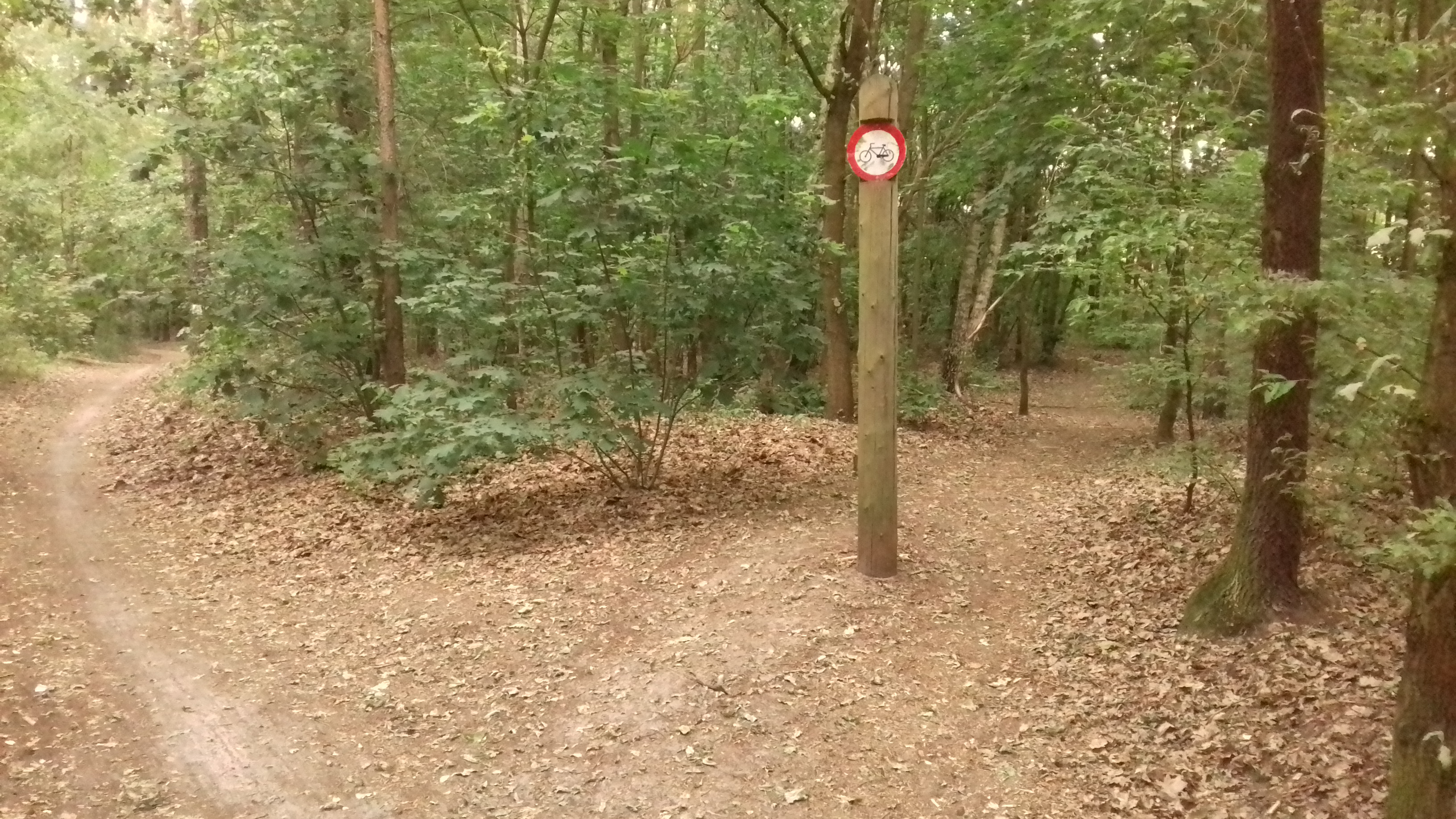 Szlak pieszy im. Fiedlera w okolicach Nadwarciańskiego Boru Sosnowego - rozwidlenie ze szlakiem rowerowym.